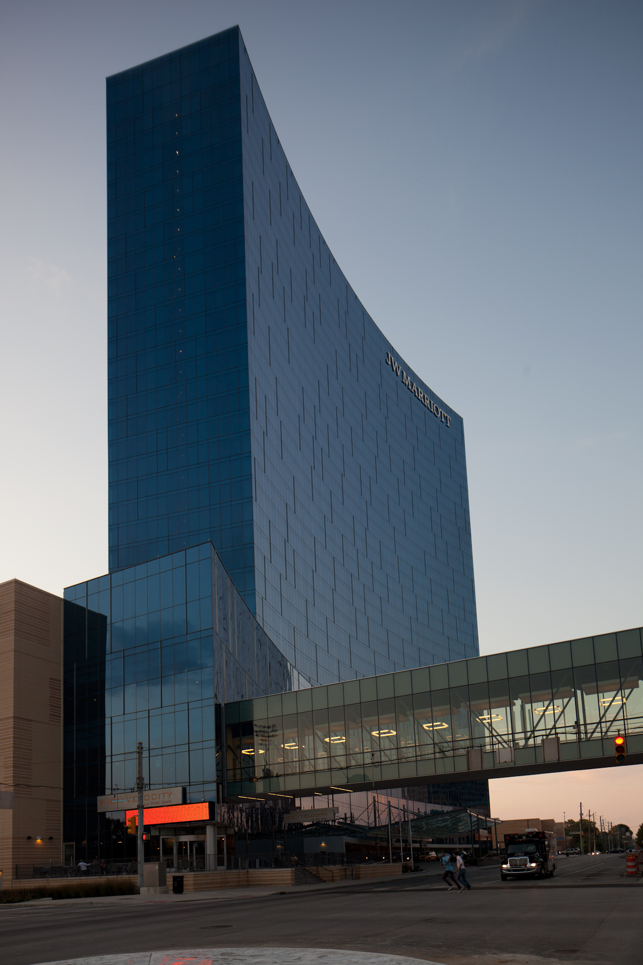 Indianapolis, Indiana, USA.